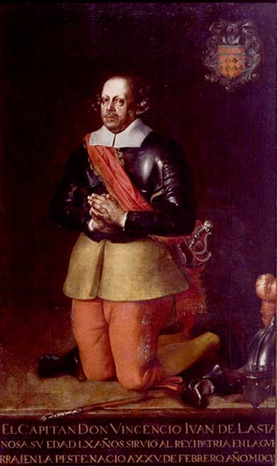 Der spanische Gelehrte Vincencio Juan de Lastanosa (1607 - 1681), Gemälde in der Kapelle Lastanosa in der Kathedrale von Huesca.